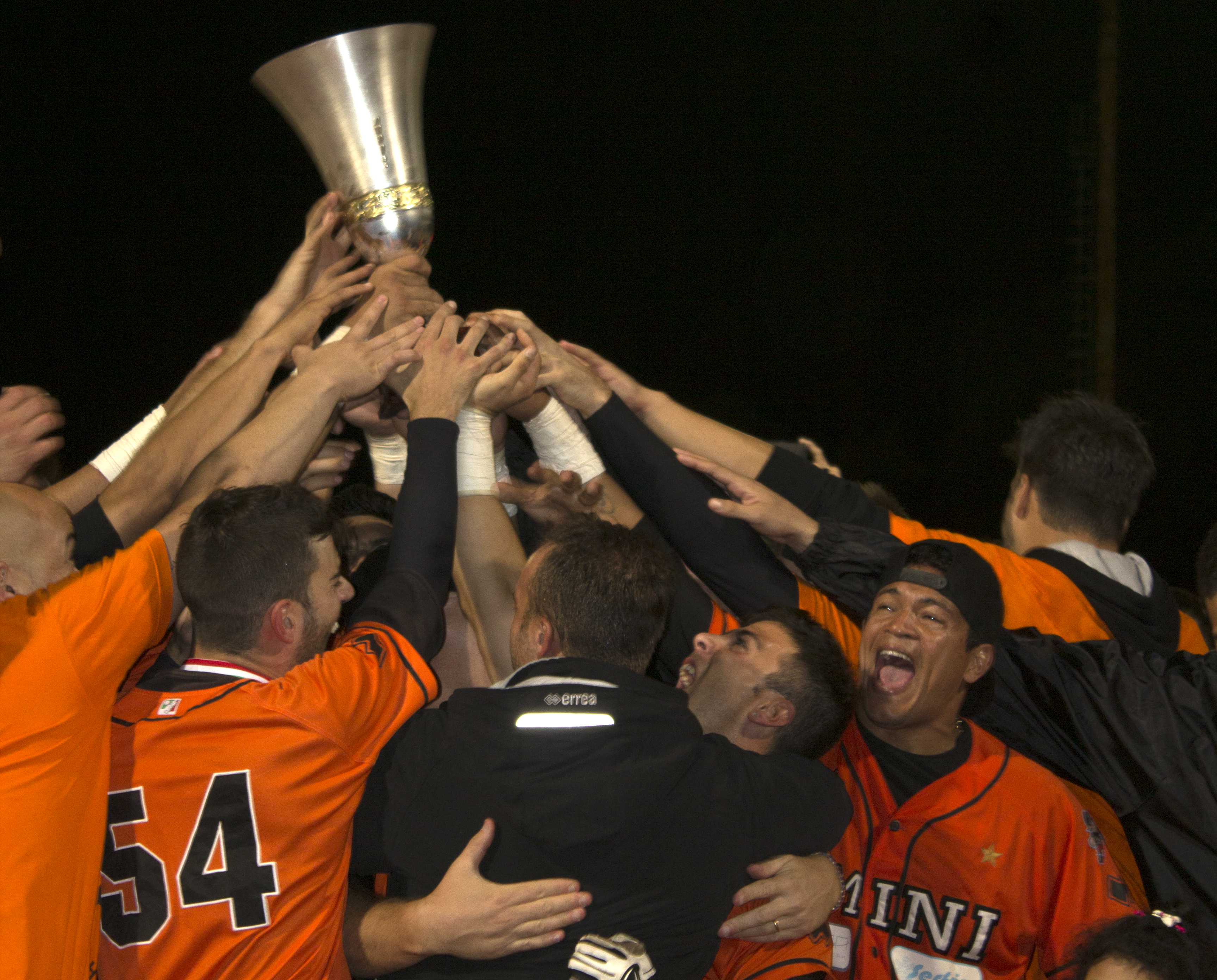 I giocatori del Rimini Baseball alzano la coppa dopo aver conquistato lo scudetto 2015.